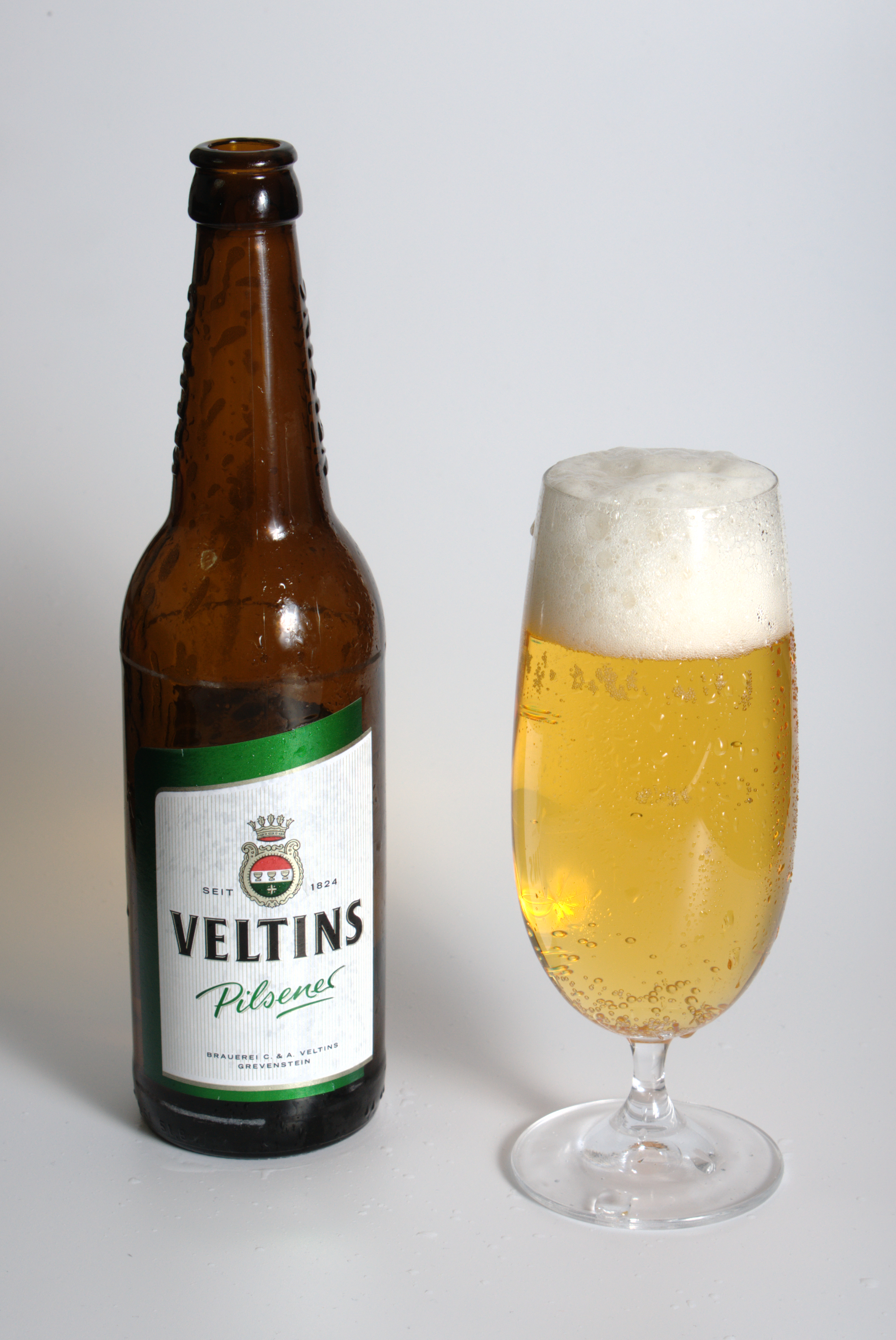 0,5l Longneck-Flasche Veltins mit Glas Pils